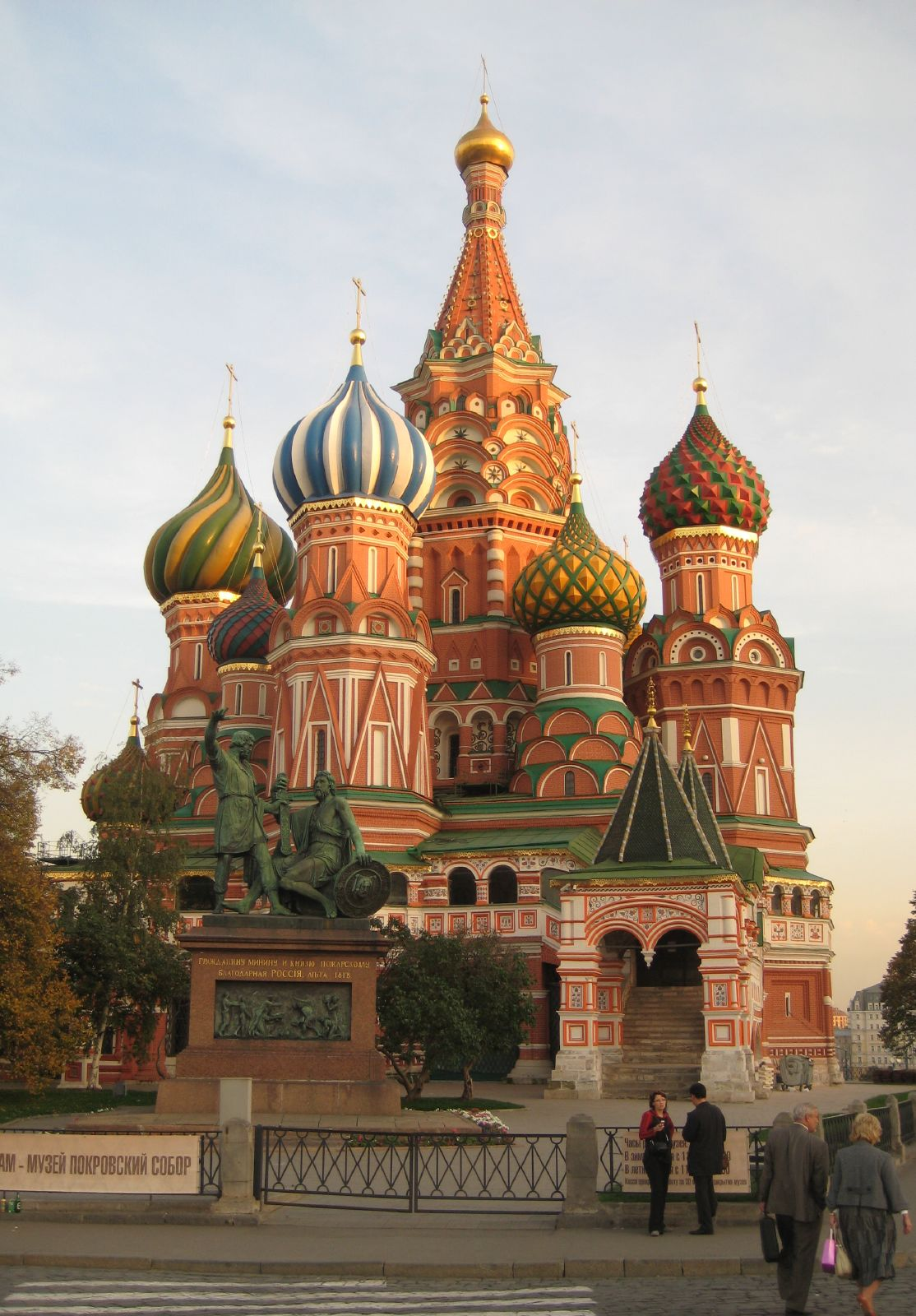 St Basil